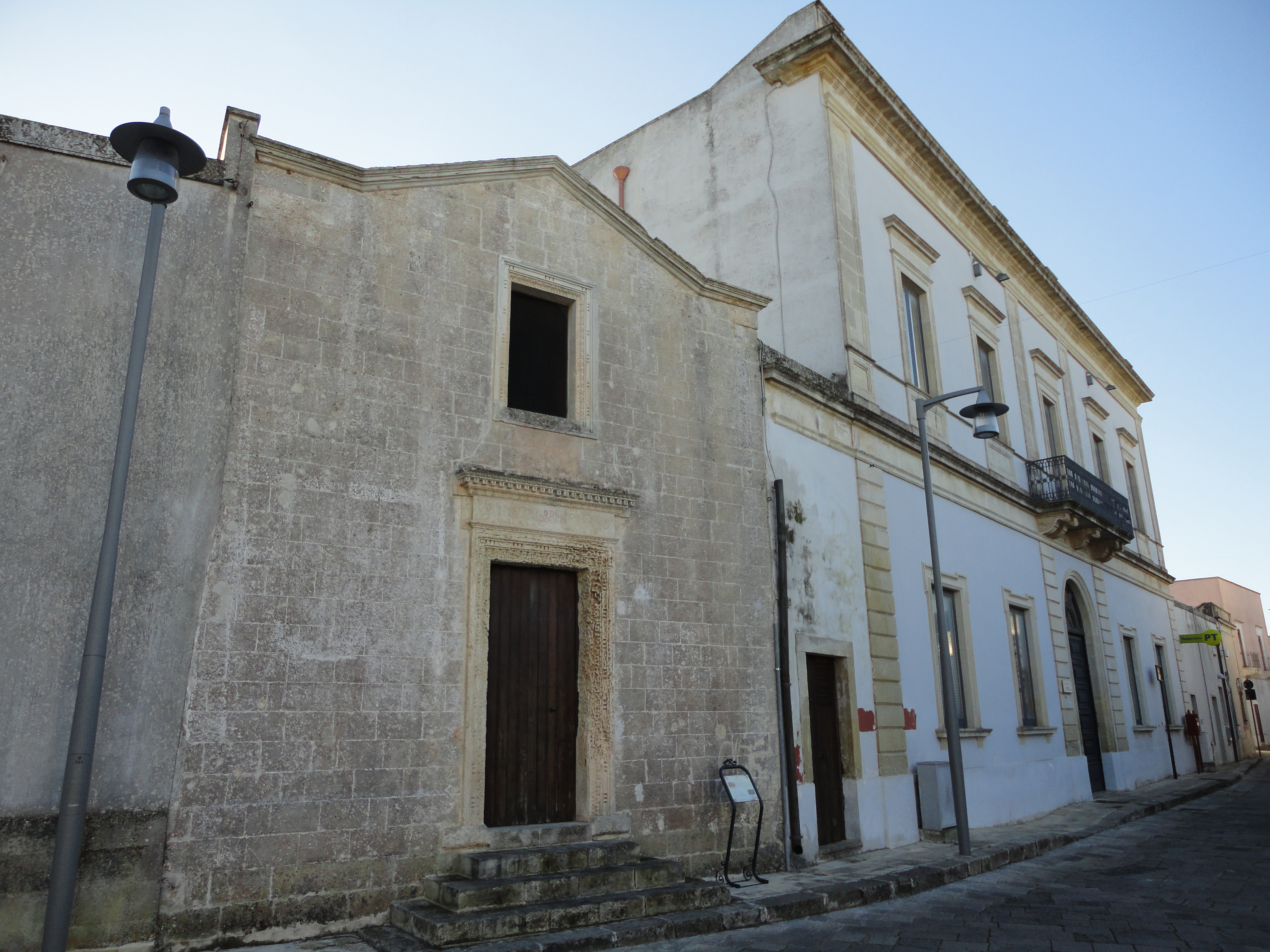 San Giovanni Battista Martignano, Lecce